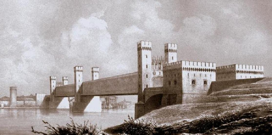 Widok mostu w początkowym okresie istnienia.